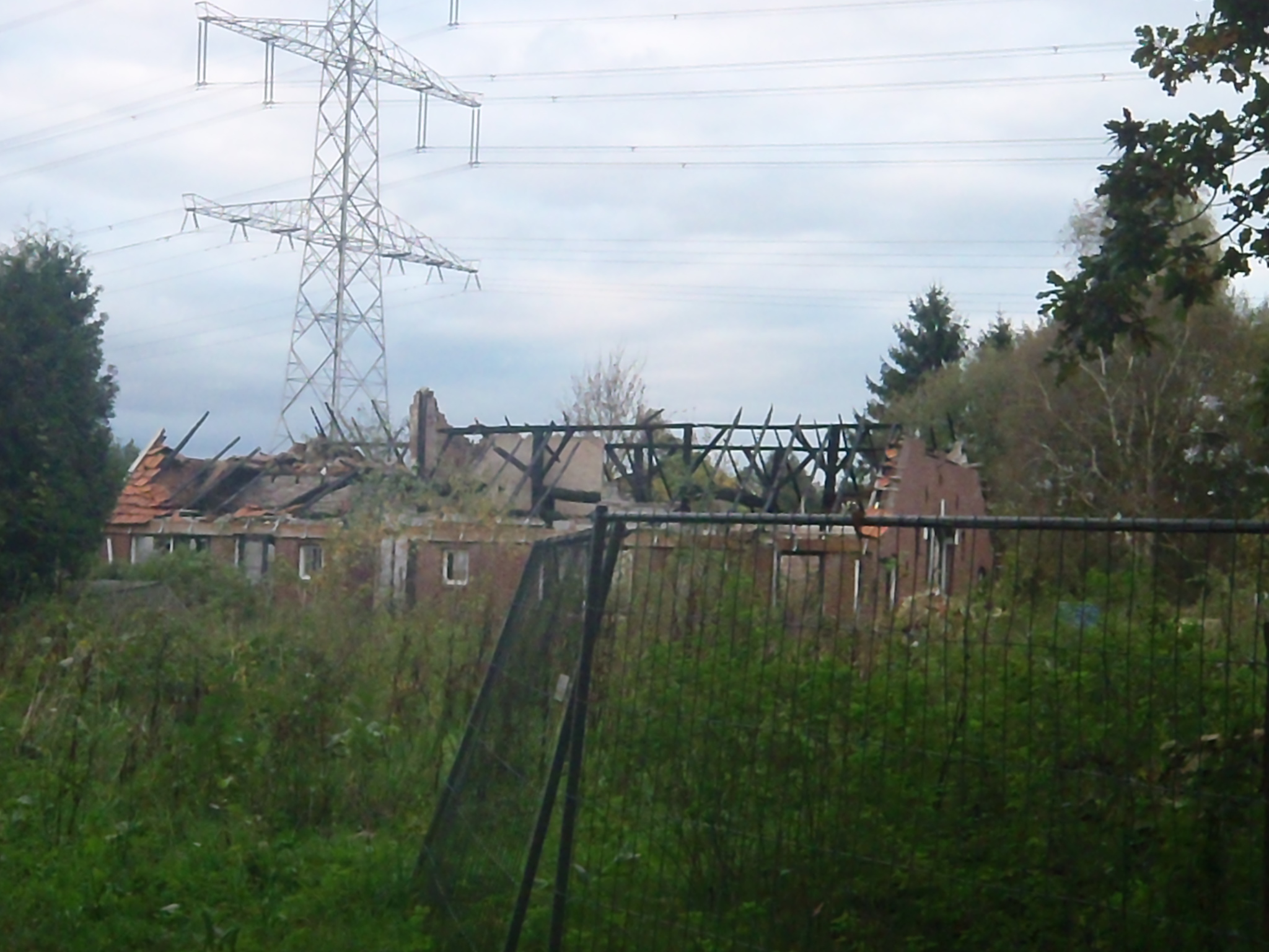 een gebouw na een brand